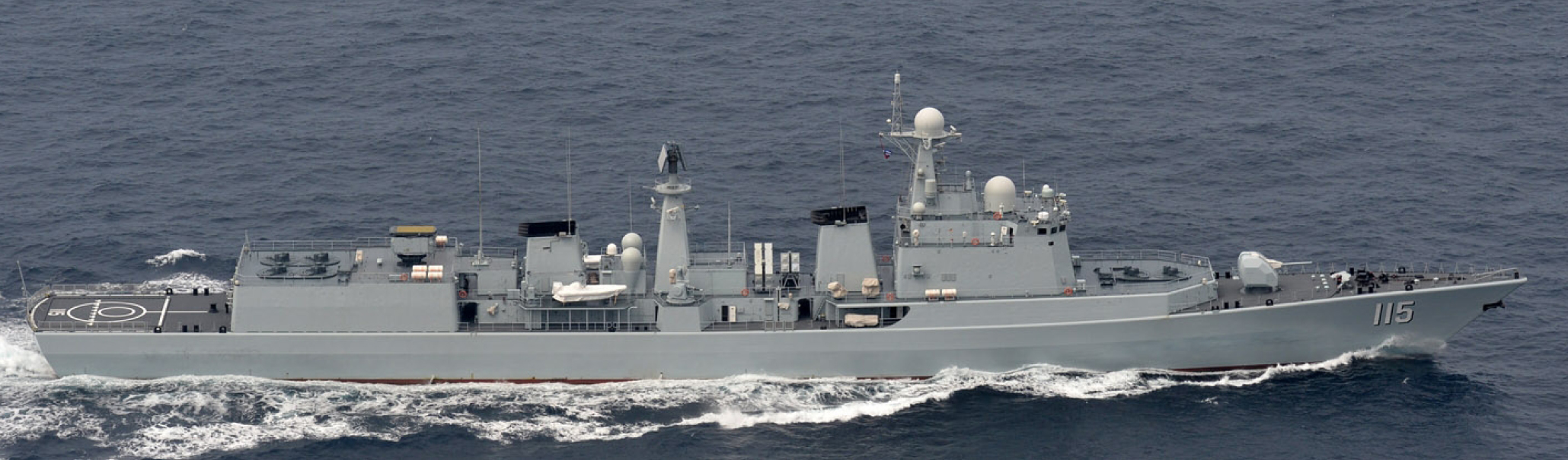 ８月２９日（土）午後４時頃、第２航空群所属「Ｐ－３Ｃ」（八戸）及び第１ミサイル艇隊所属「くまたか」（大湊）が、宗谷岬の北西約９０ｋｍの海域を東進する中国海軍ルージョウ級ミサイル駆逐艦１隻、ジャンカイII級フリゲート２隻、ユージャオ級揚陸艦１隻、フチ級補給艦１隻の合計５隻を確認した。その後、当該艦艇が宗谷海峡を東航したことを確認した。なお、当該艦艇は、８月１７日（月）に対馬海峡を北上したものと同一である。